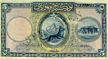 E1 serisi 5 TL'nin ön yüzü